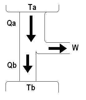 Calor Qa convertido em trabalho,Gustinho Rossi.